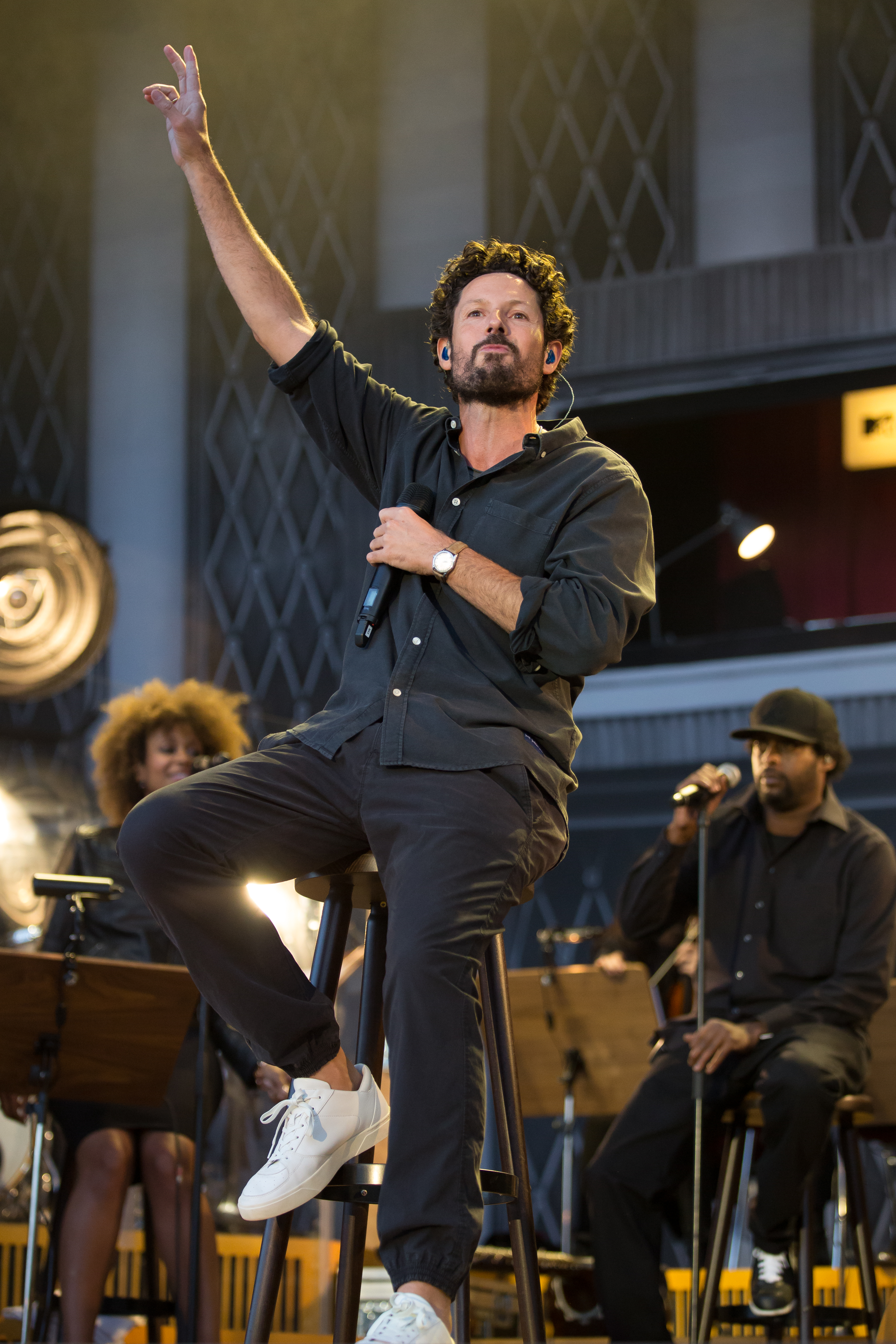 Max Herre 2014 live auf der Trabrennbahn in Hamburg